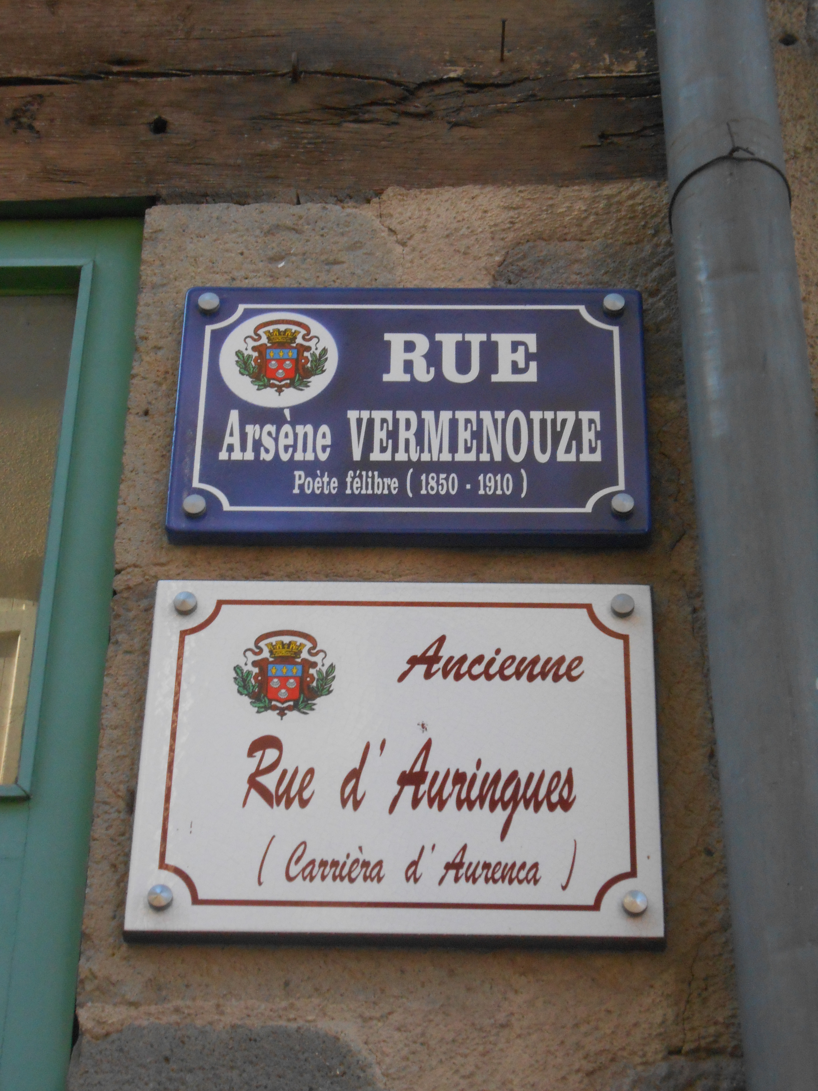 Plaque de rue bilingue français/occitan à Aurillac, Auvergne.